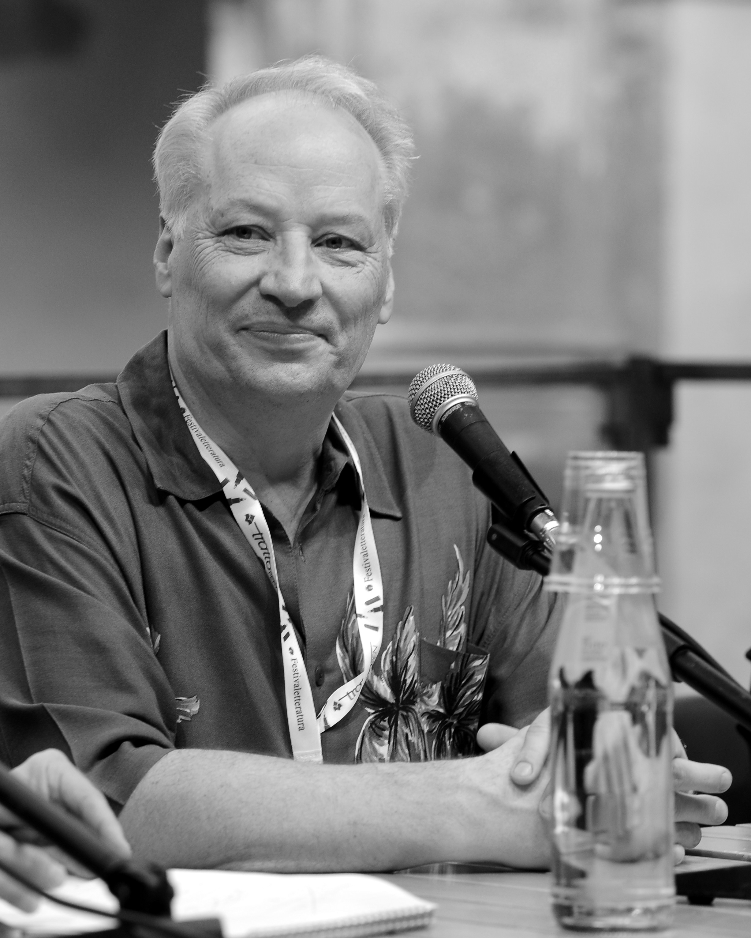 Joe R. Lansdale a Mantova per il Festivaletteratura 2012.